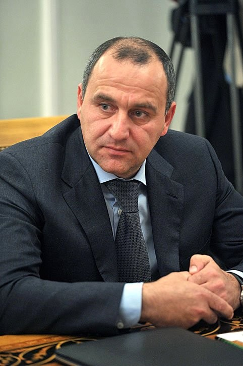 Глава Карачаево-Черкесии Рашид Темрезов на встрече с президентом РФ Владимиром Путиным